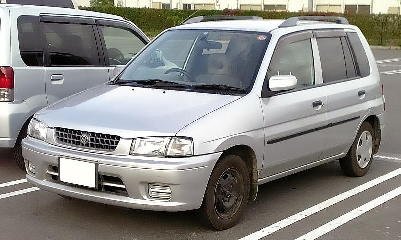 マツダ・デミオ（初代・前期型）